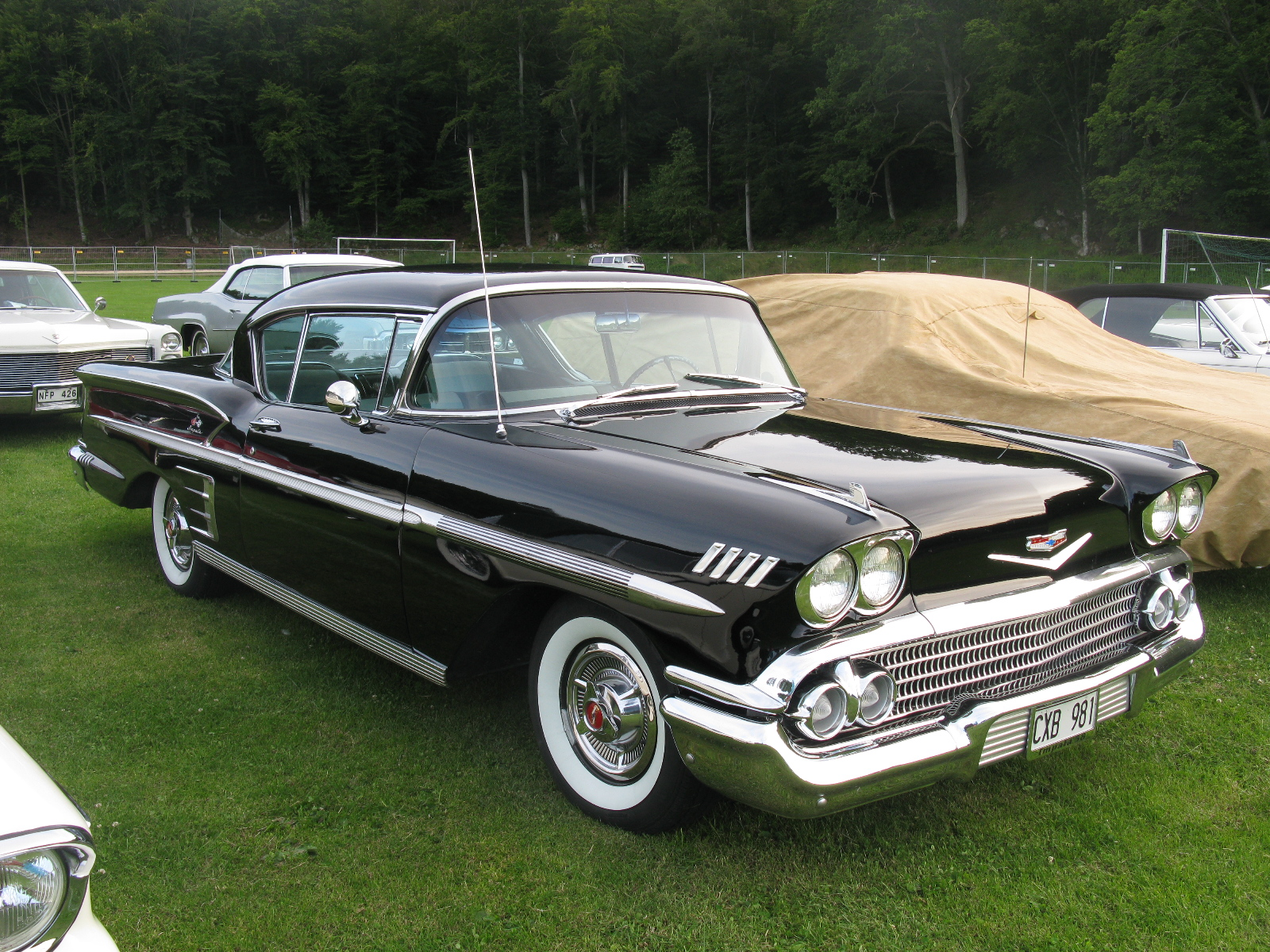 Chevrolet Impala 1958